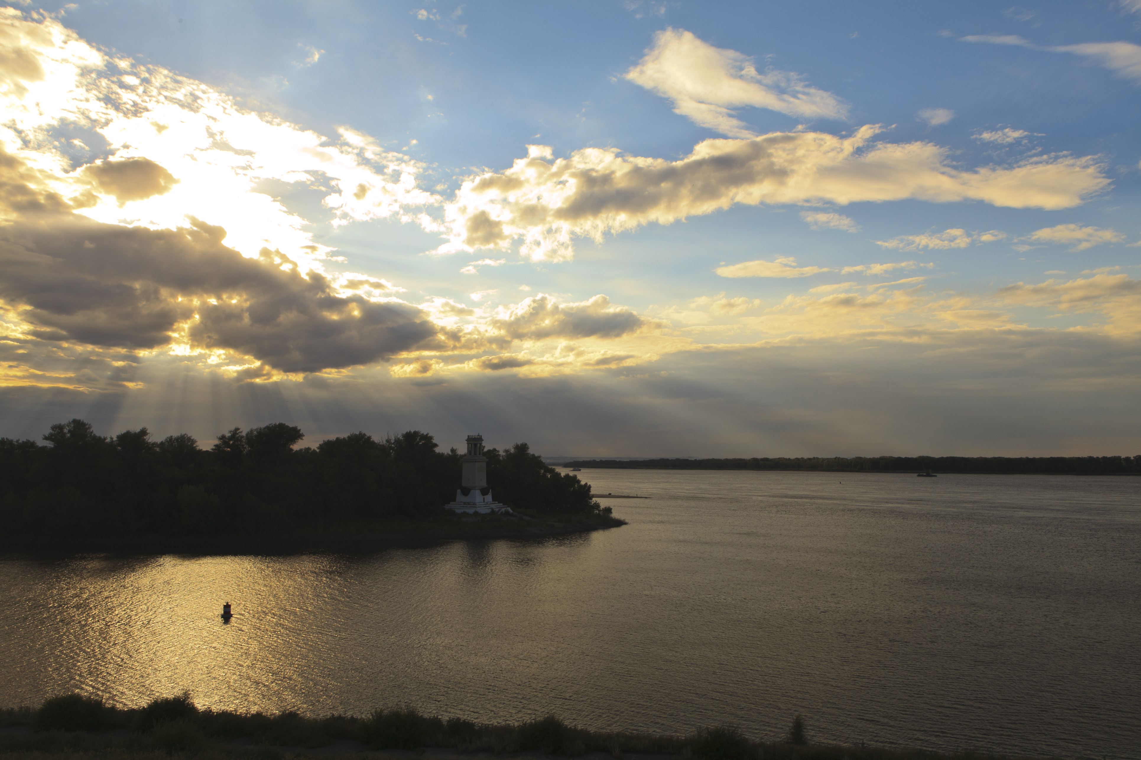 Маяк (Волгоградская область, Волгоград, город Волгоградберег, берег р. Волга, у входа в 1-й шлюз, Волго-Донский судоходный канал им. В. И. Ленина)